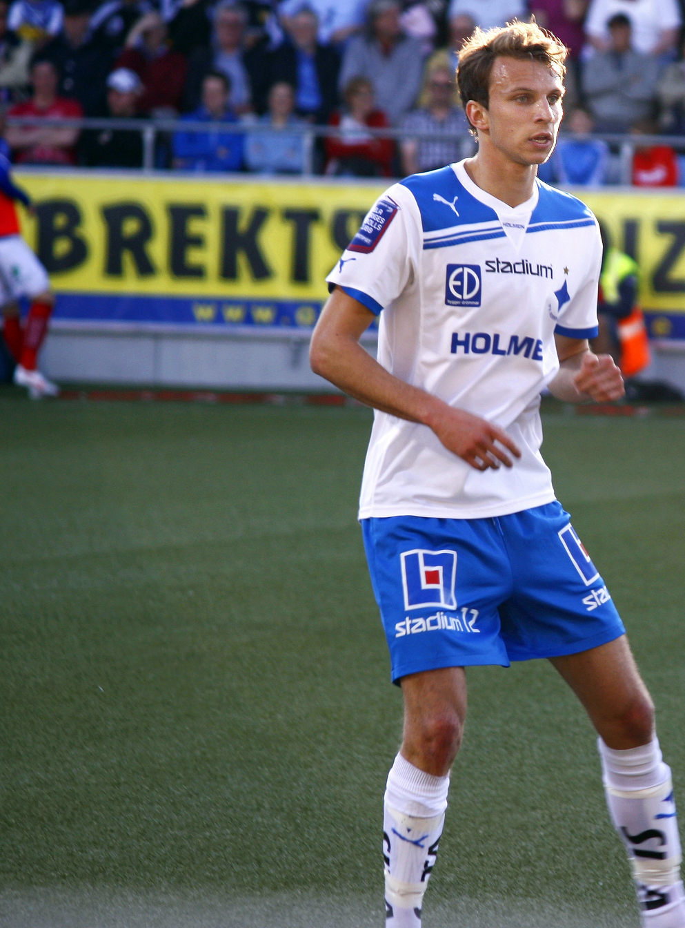 IFK Norrköpings mittfältare Lars Christian Krogh Gerson under östgötaderbyt 2012 mellan IFK Norrköping och Åtvidabergs FF på Nya Parken. Bilden tagen med en Canon EOS 1000D plus telelinsen 55-250mm